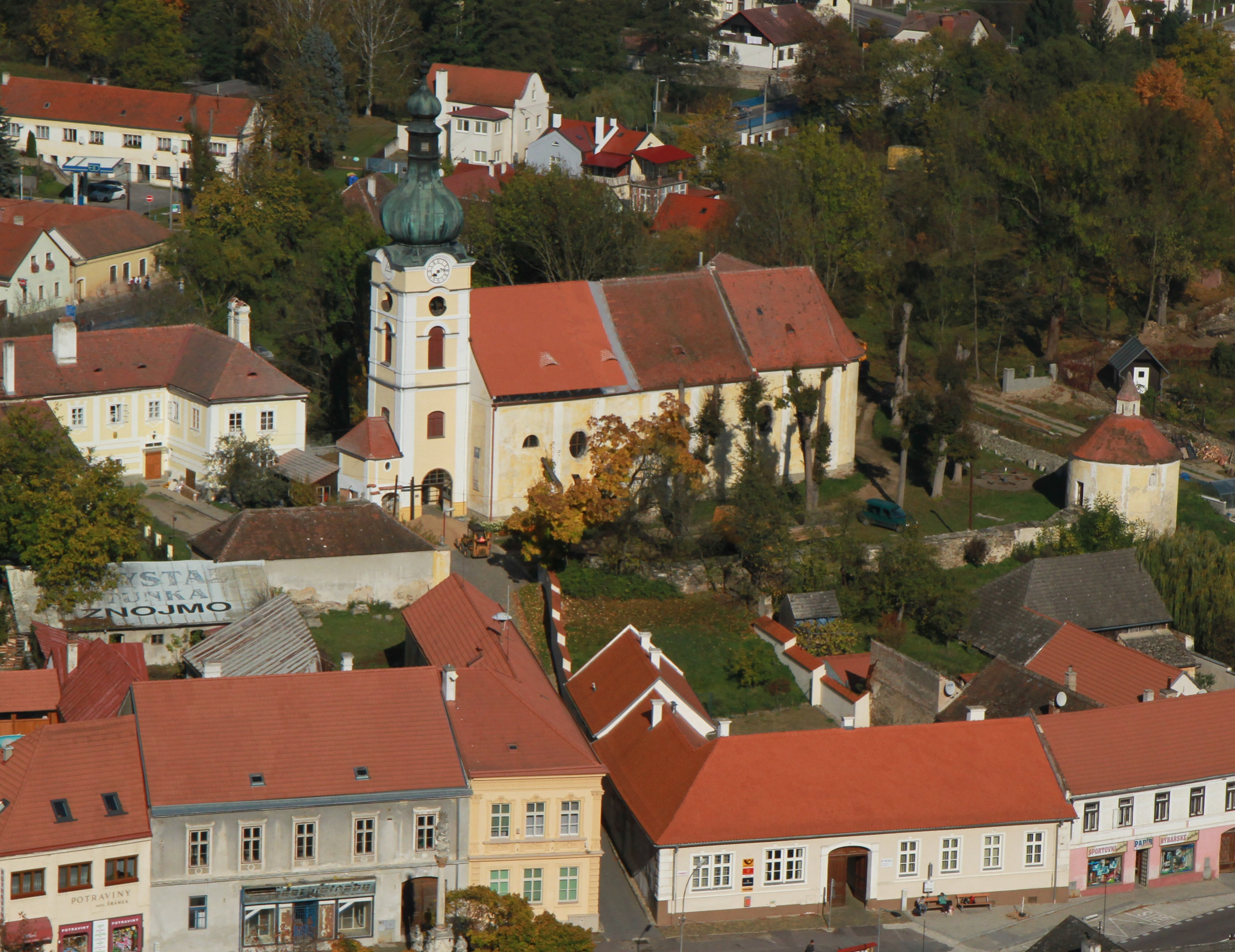 Kostel Nanebevzetí P. Marie (Vranov nad Dyjí), Vranov nad Dyjí